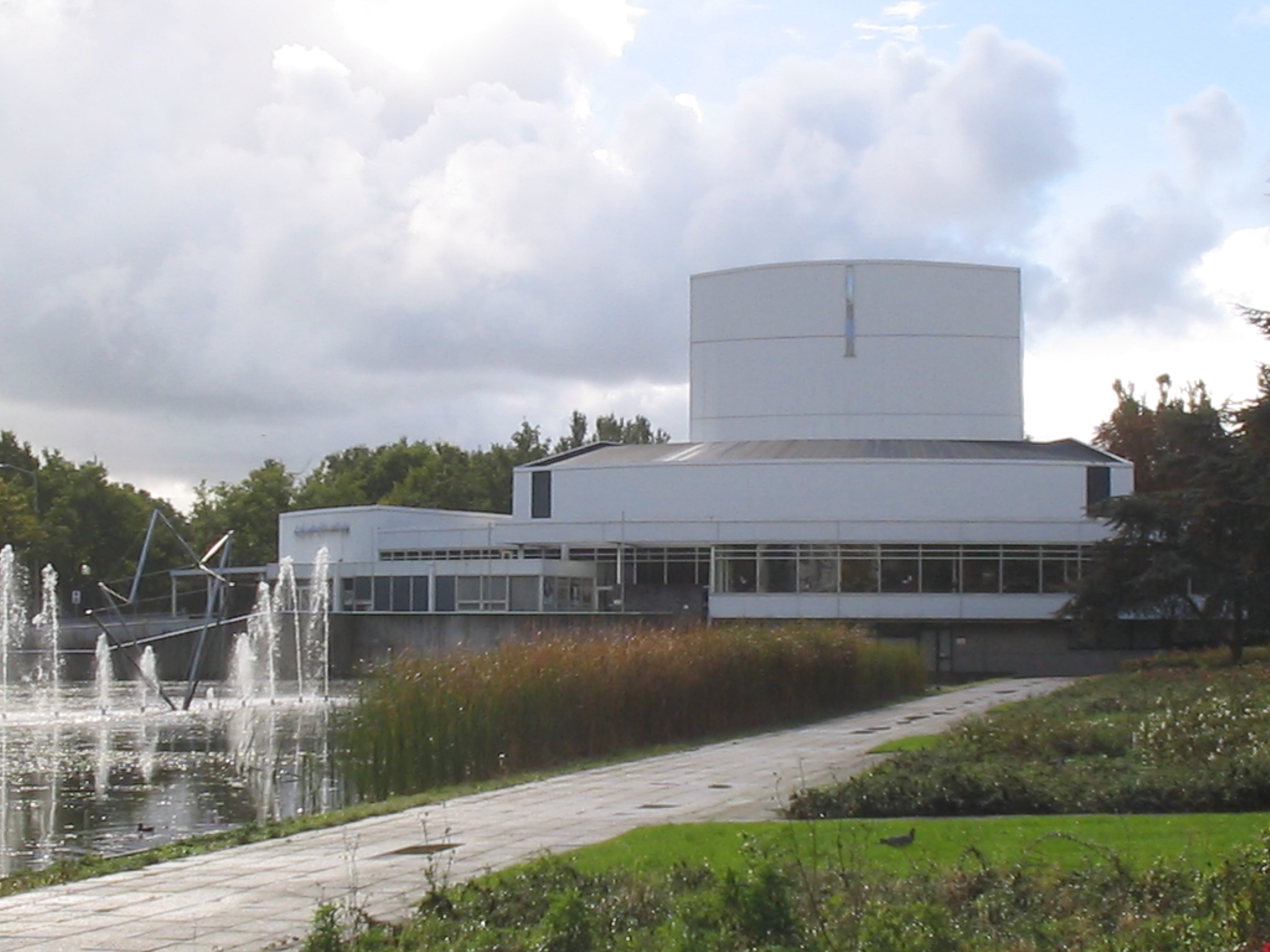 Rijswijkse schouwburg (a theater), Rijswijk, 2 oktober 2005